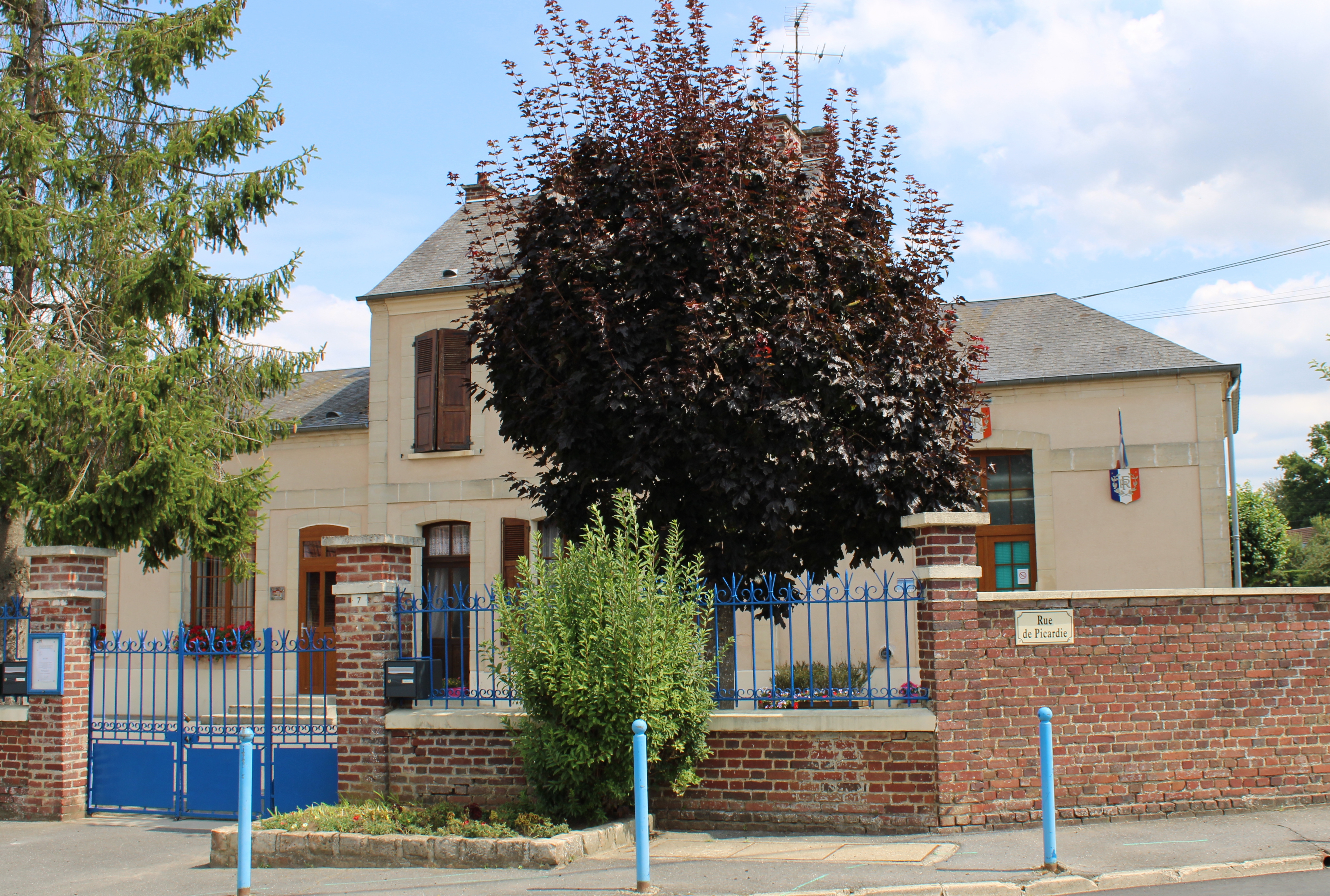 La mairie